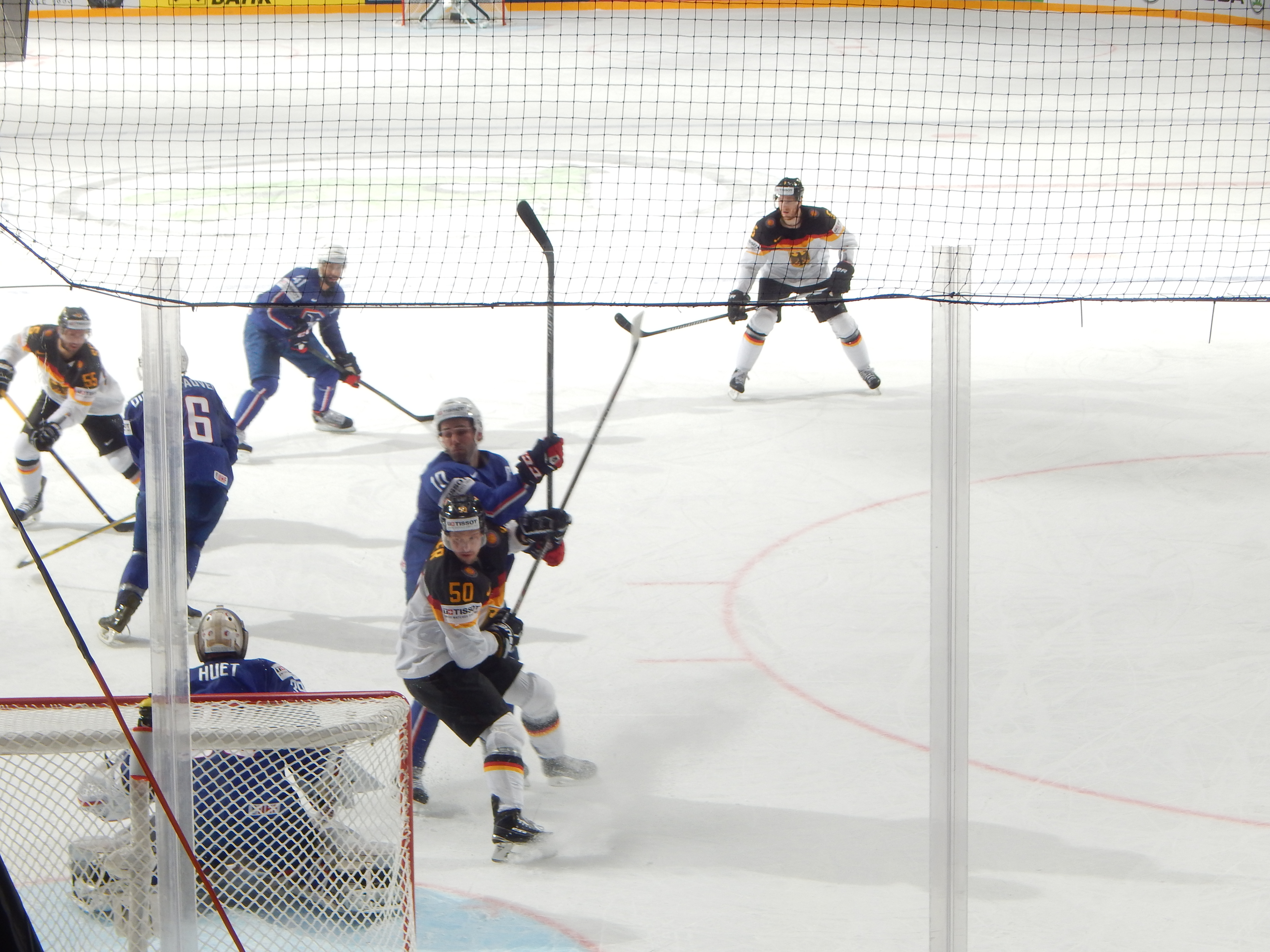 Феликс Шютц забивает гол и выводит сборную Германии вперёд в матче с Францией